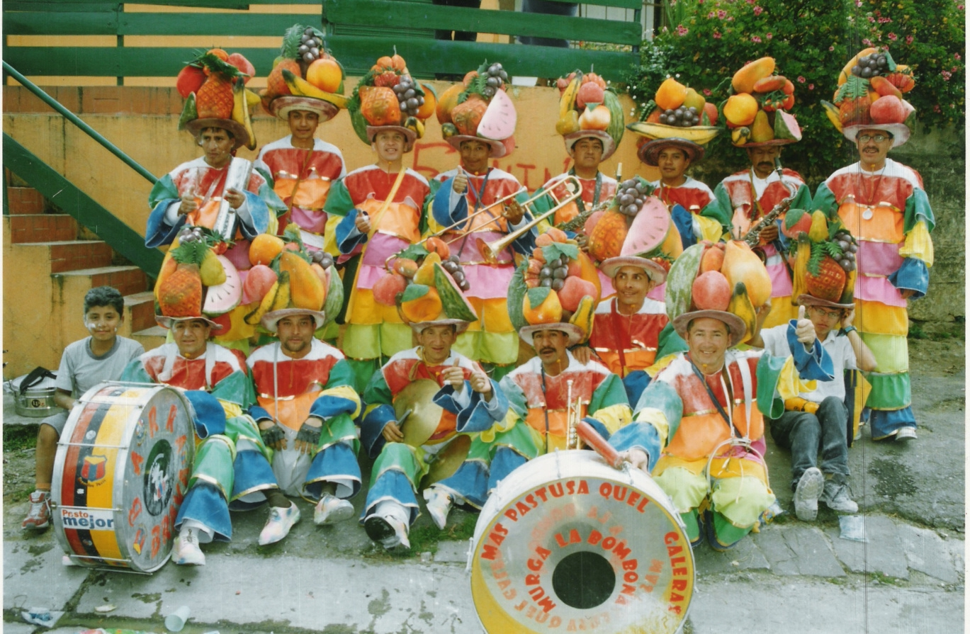 Un grupo de murga al finalizar el desfile del Carnaval de Negros y Blancos en Pasto, enero de 2004.